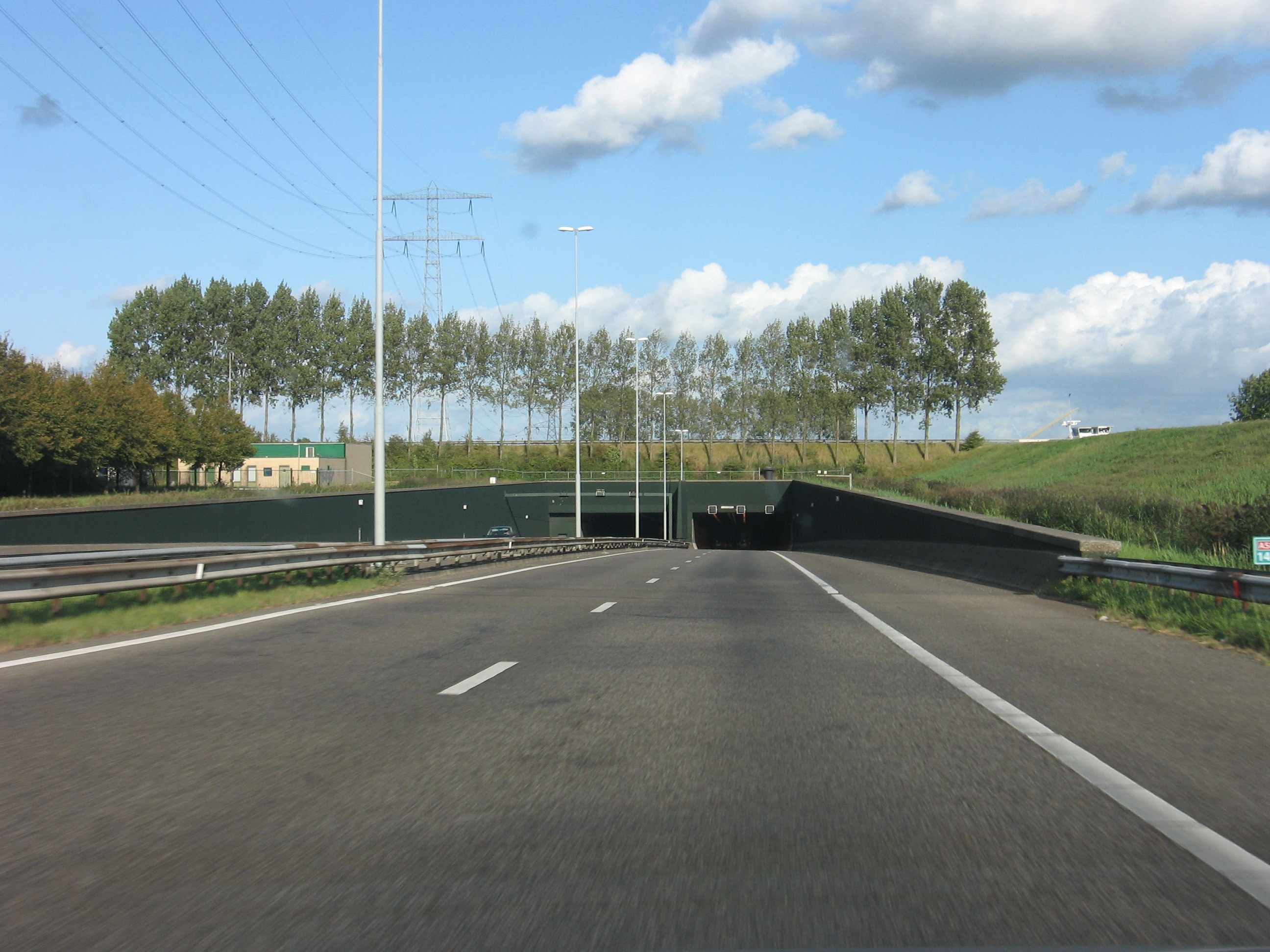 Vlaketunnel, A58, Westelijke ingang